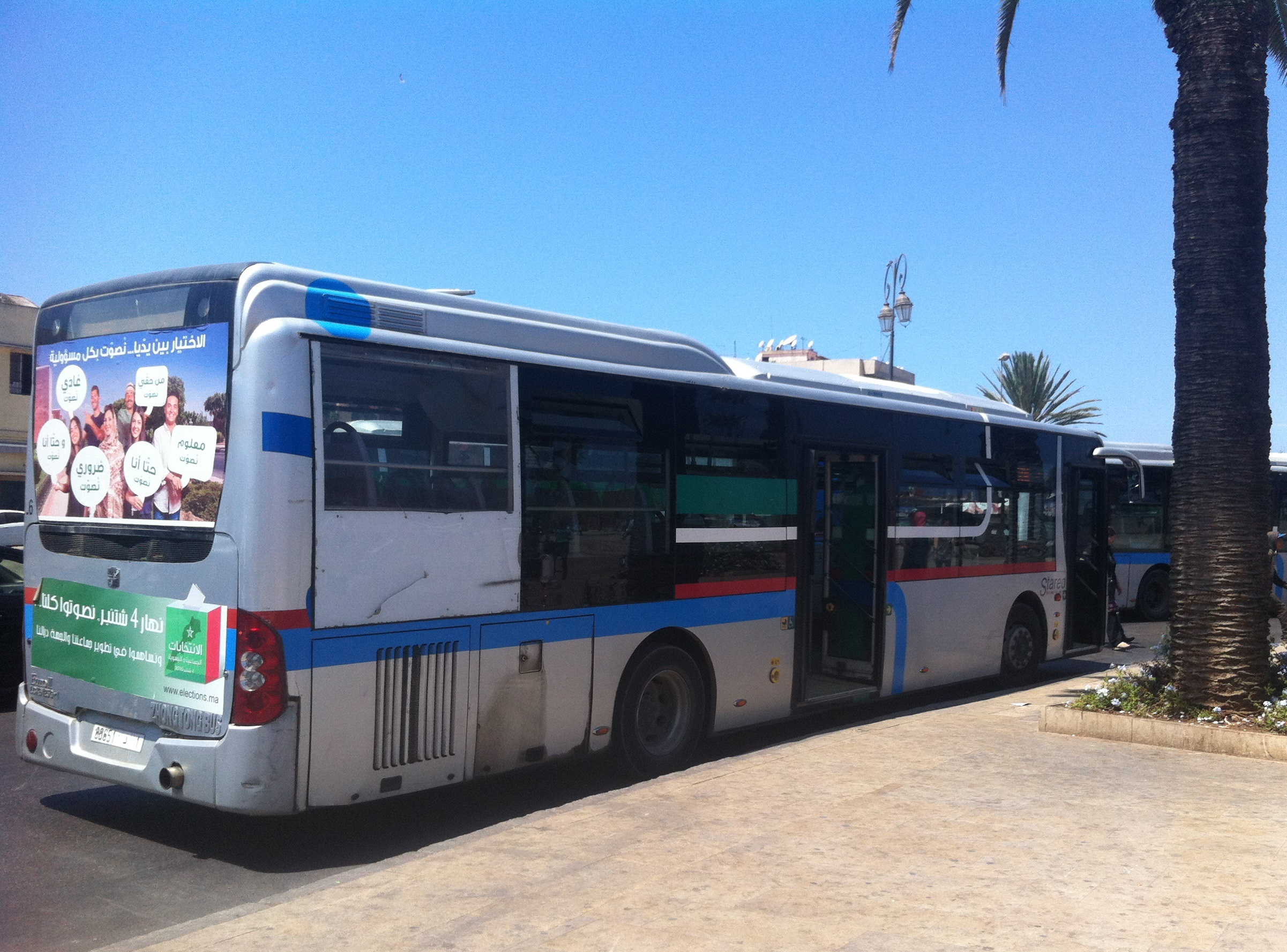 Bus dans la station de Bab El Had